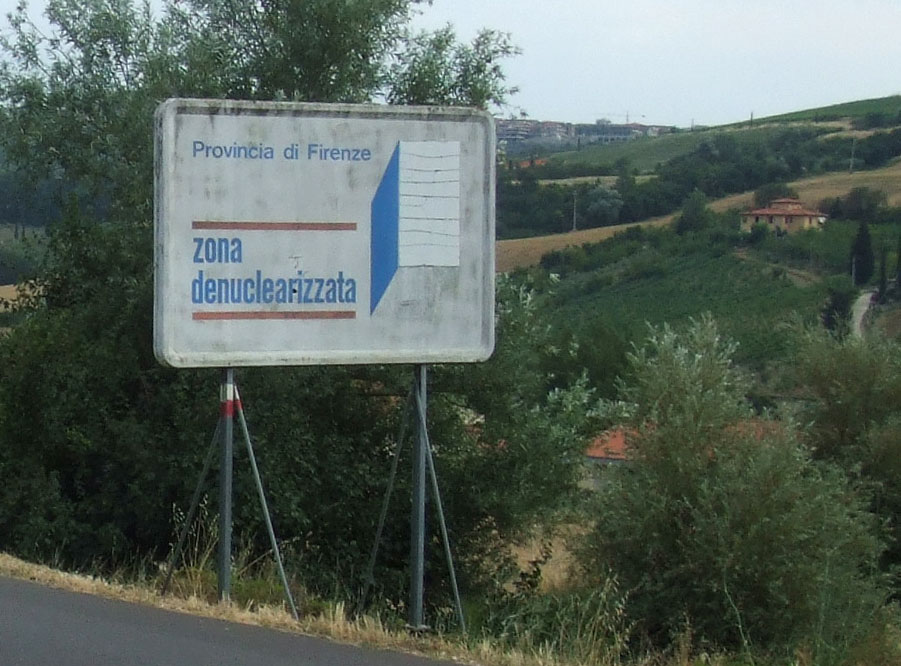 panneau indicateur sur le caractère non-nucléaire des installations locales de Florence